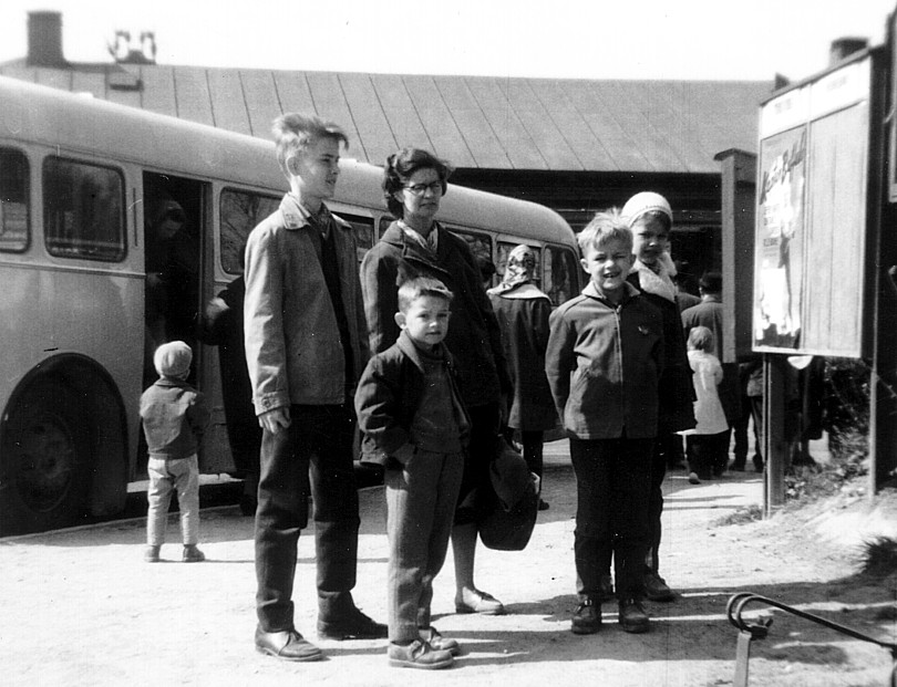 En stockholmsfamilj deltar i Operation Stockholm, den omfattande evakueringsövning som genomfördes 1961 där över 30 000 personer deltog.